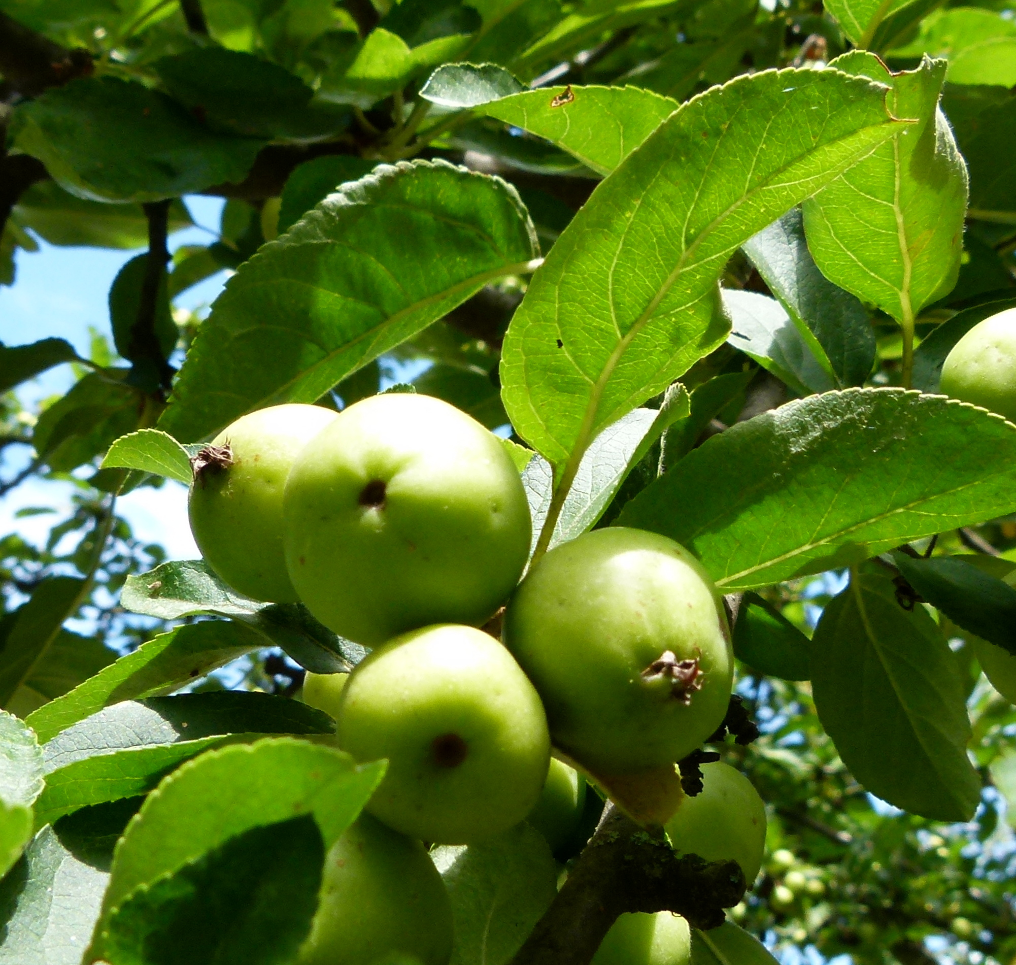 Pommier à fleurs - Malus X Zumi